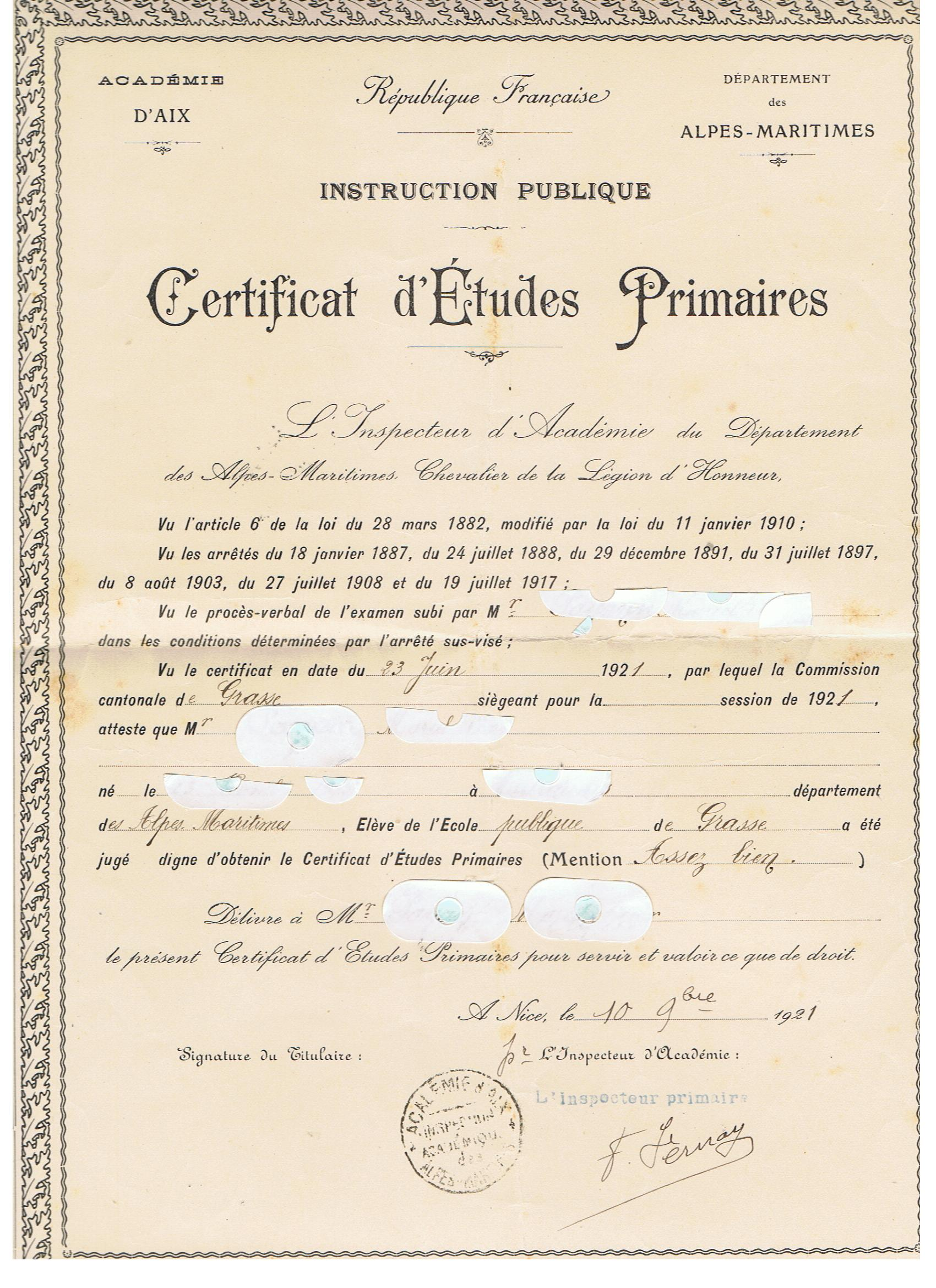 Certificat d'études primaires obtenu à l'âge de onze ans le 23 juin 1921, le diplôme correspondant ayant été établi le 10 septembre 1921